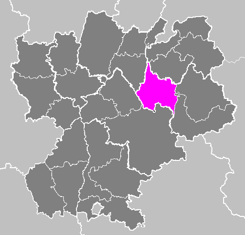 Maps of arrondissements and cantons of France: Arrondissement de Chambéry.PNG (Région Rhône-Alpes)